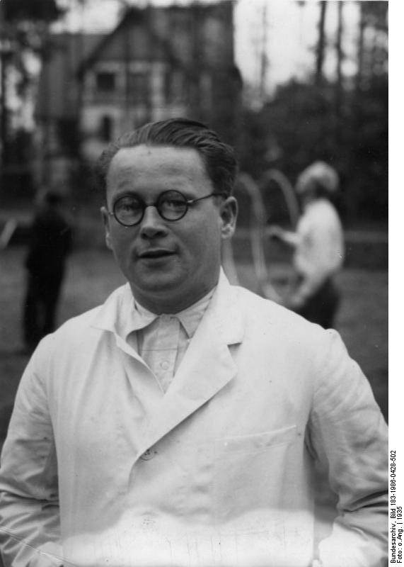 Karl Gebhardt Scherl: Dr. Gebhardt, der bekannte Leiter der Klinik für Sport- und Arbeitsschäden in den Heilstätten Hohenlychen. Bekannt sind auch seine Schulungskurse für Körperbehinderte ADN: ADN-ZB/Archiv Karl Gebhardt, Prof. Dr. med. geb. 23.11.1897 Ordinarius für orthopädische Chirurgie an der Charié in Berlin, Leiter der Madizinischen Abteilung der Reichsakademie für Leibesübungen, Chefarzt der Heilanstalt Hohenlychen, Oberster Kliniker beim Reichsarzt der SS, SS-Brigadeführer, Generalmajor der Waffen-SS. Er war u.a. verantwortlich für die Sulfonamidversuche im KZ Ravensbrück. Gebhardt wurde am 20.8.1947 durch den I. Amerikanischen Militärgerichtshof in Nürnberg wegen Verbrechens gegen die Menschlichkeit zum Tode verurteilt und am 2.6.1948 hingerichtet. Gebhardt 1935 in Hohenlychen. 37589-35 [Heilanstalt Hohenlychen.- Dr. Karl Gebhardt im Arztkittel] Abgebildete Personen: Gebhardt, Karl Prof. Dr. med.: Oberster Kliniker beim SS-Reichsarzt, Generalmajor, Ritterkreuz (RK), Deutschland (PND 119200805)